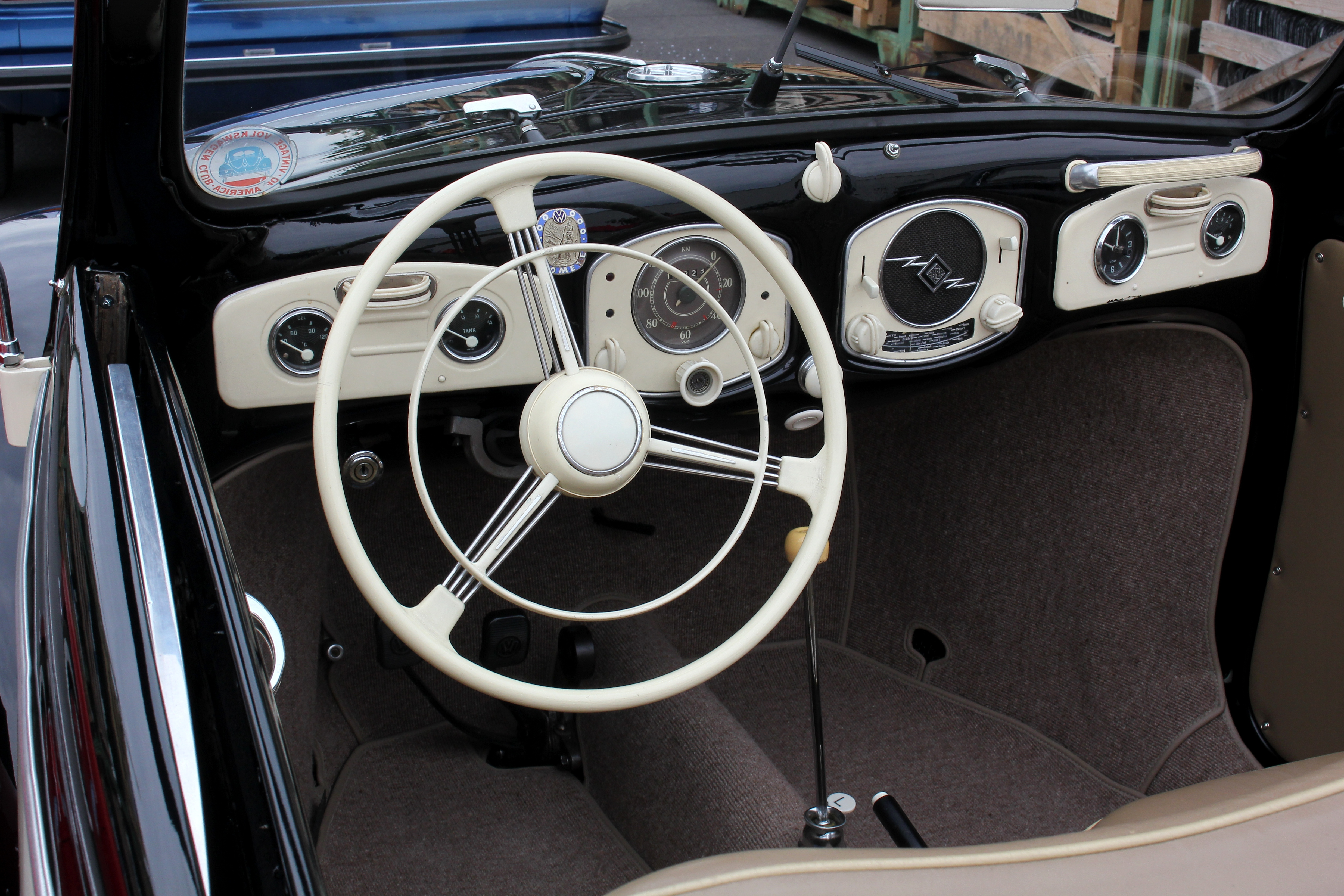 Cockpit des VW Typ 1, Cabriolet von Hebmüller, Baujahr 1949/50, Motor 1131 cm³, 25 PS; 696 Stück wurden gebaut.